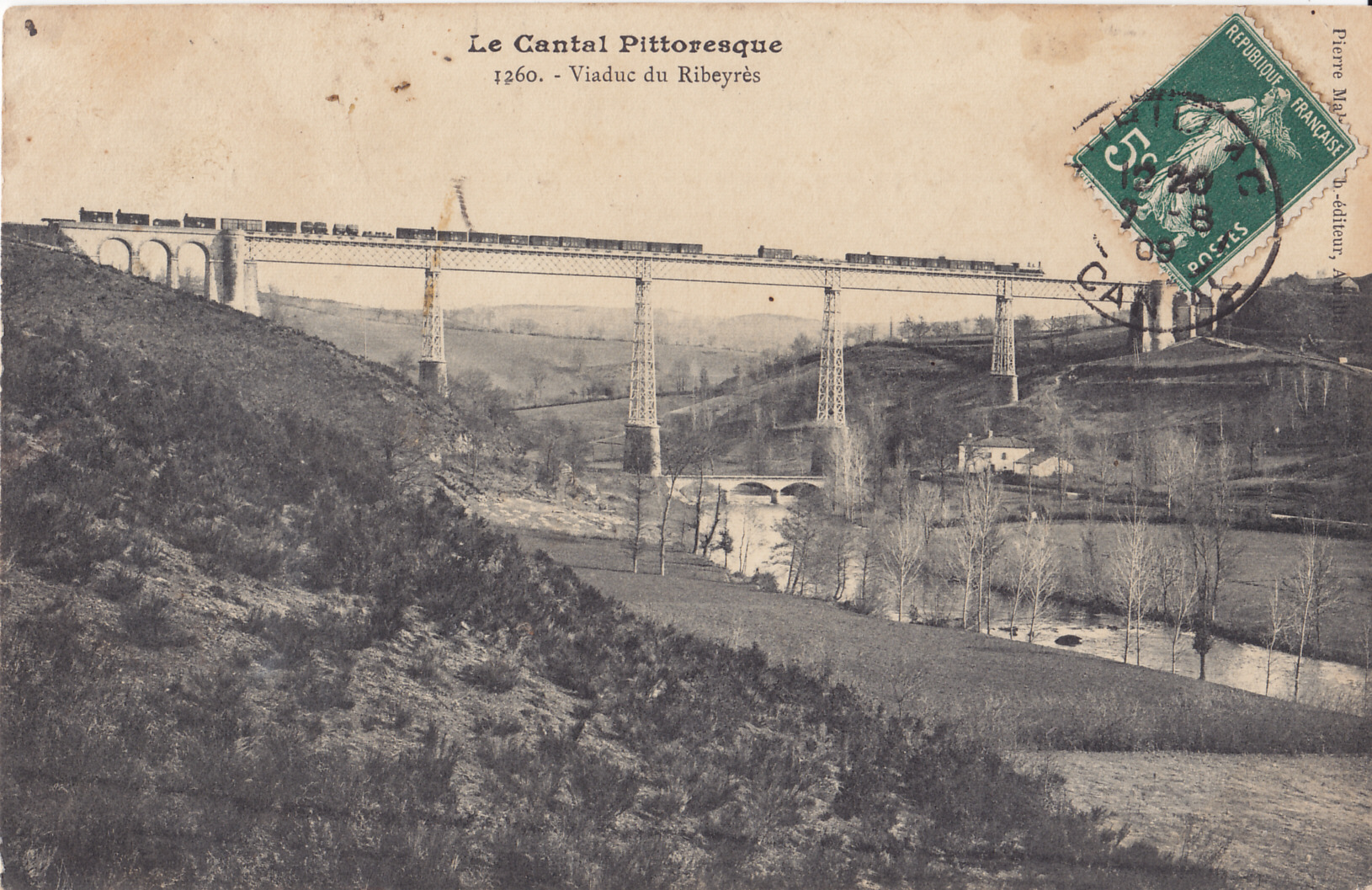 Carte postale ancienne éditée par Pierre Malroux , collection Le Cantal pittoresque, n°1260 :Viaduc du Ribeyrès